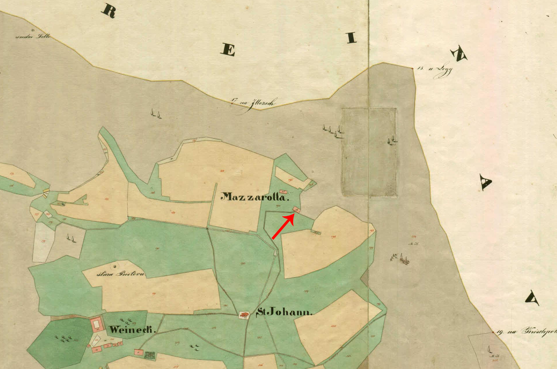 Franciscejski kataster za Kranjsko, 1823-1869